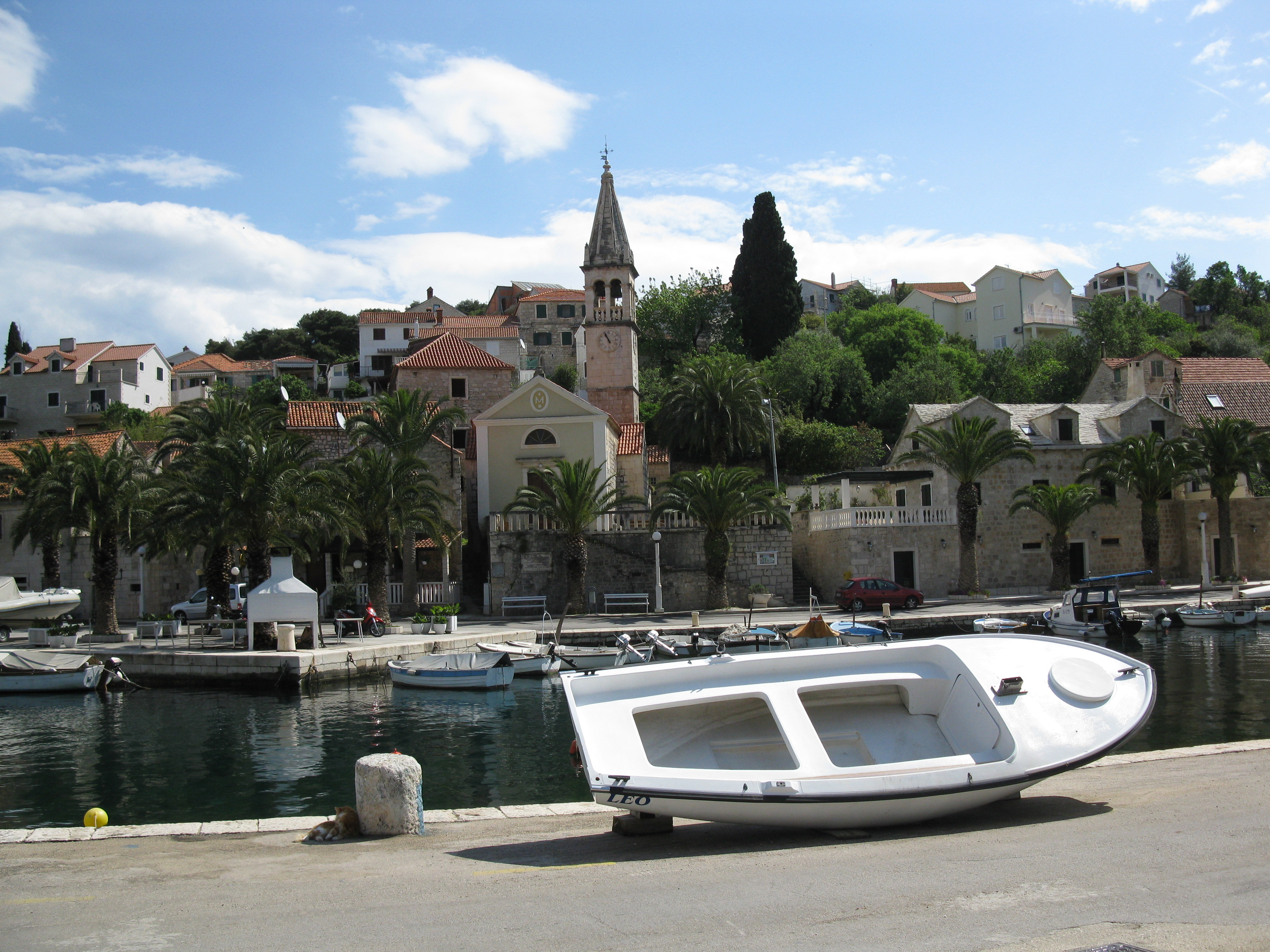 Vue sur le village de Splitska sur l'Ile de Brac en Croatie, face à Split.